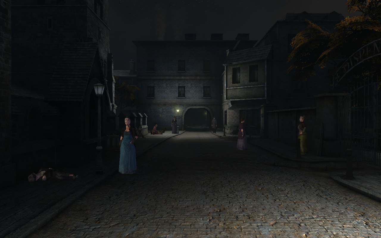 Capture d'écran du jeu Sherlock Holmes contre Jack l'Éventreur. Nous sommes ici dans une rue de Whitechapel, de nuit. La réalisation du quartier de Whitechapel dans ce jeu est réputée pour son réalisme.